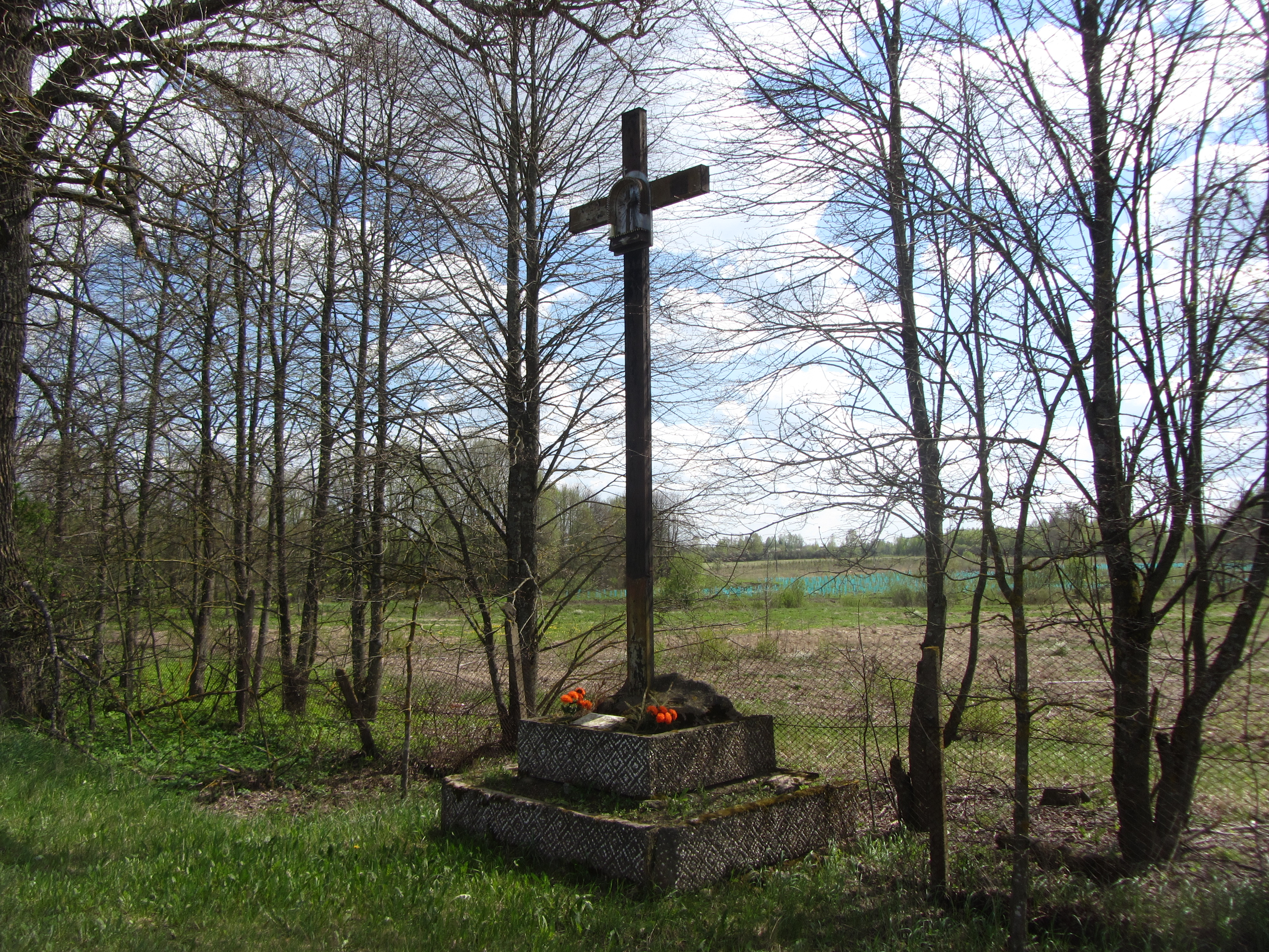 Pilypai 18216, Lithuania